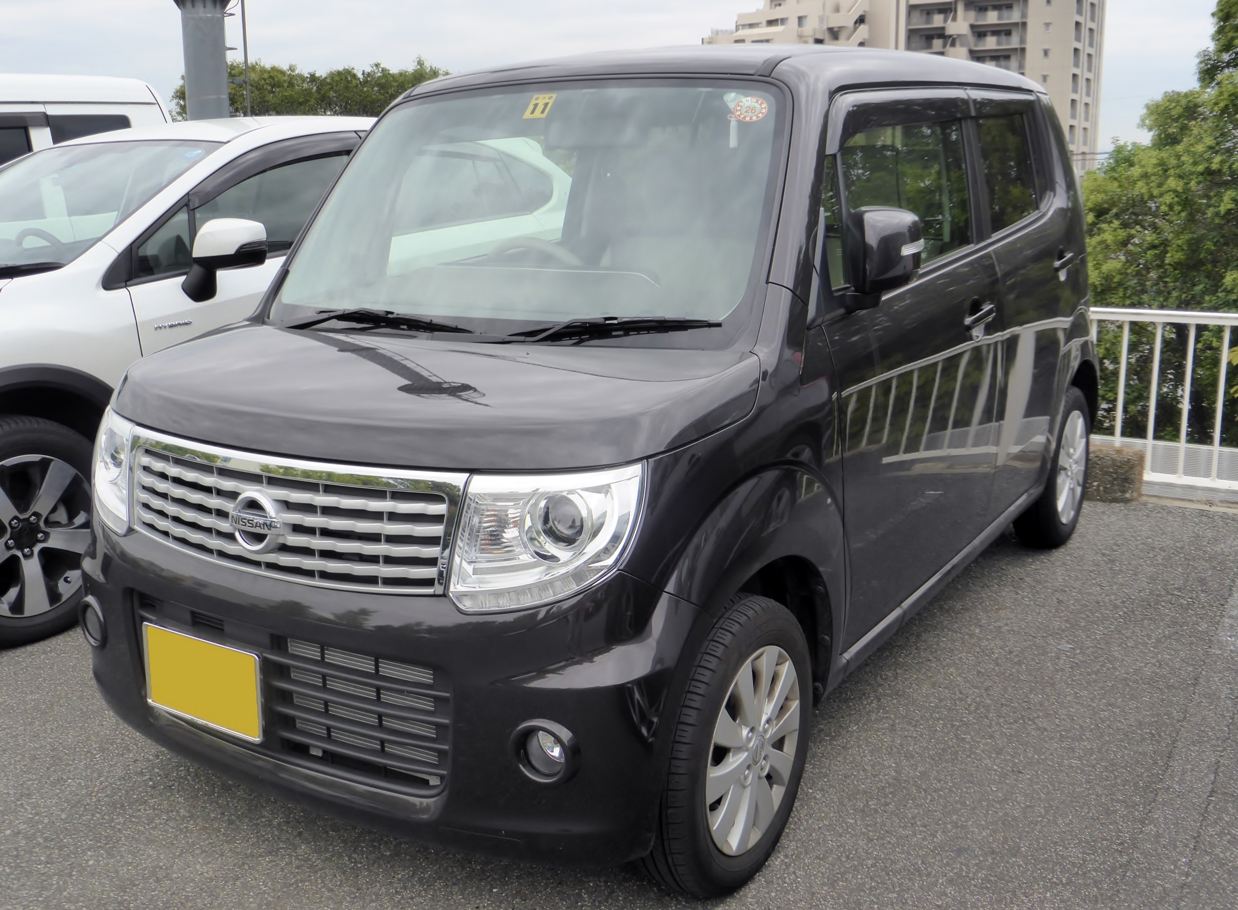 SA2型日産・モコドルチェXをフロントから撮影。